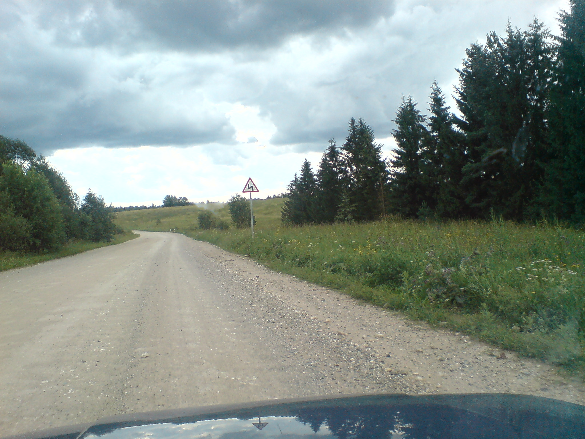 Вид на бывшую деревню Степановскую в Кирилловском районе Вологодской области с дороги Белозерск-Кириллов